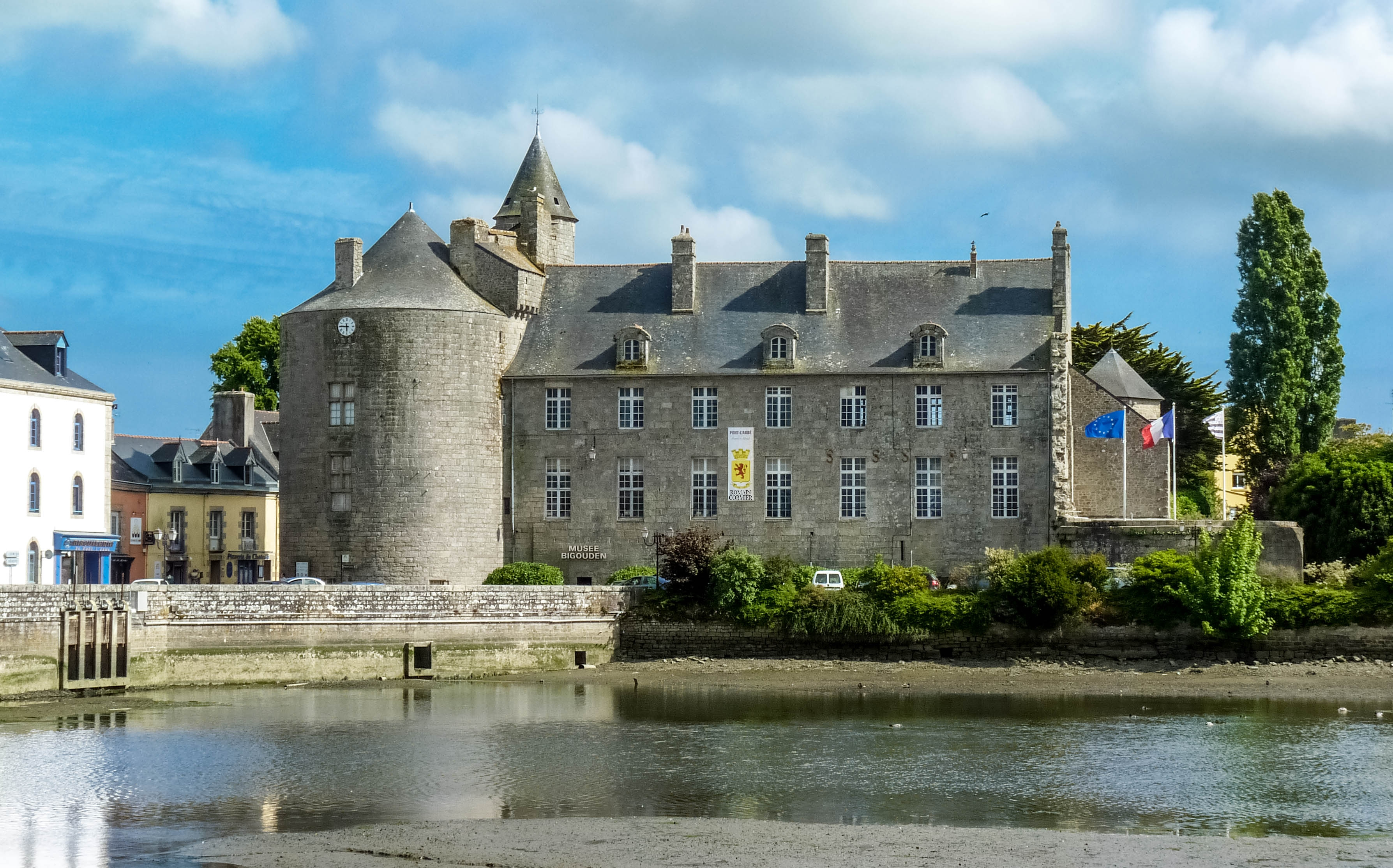 Chateau de Pont l'Abbé